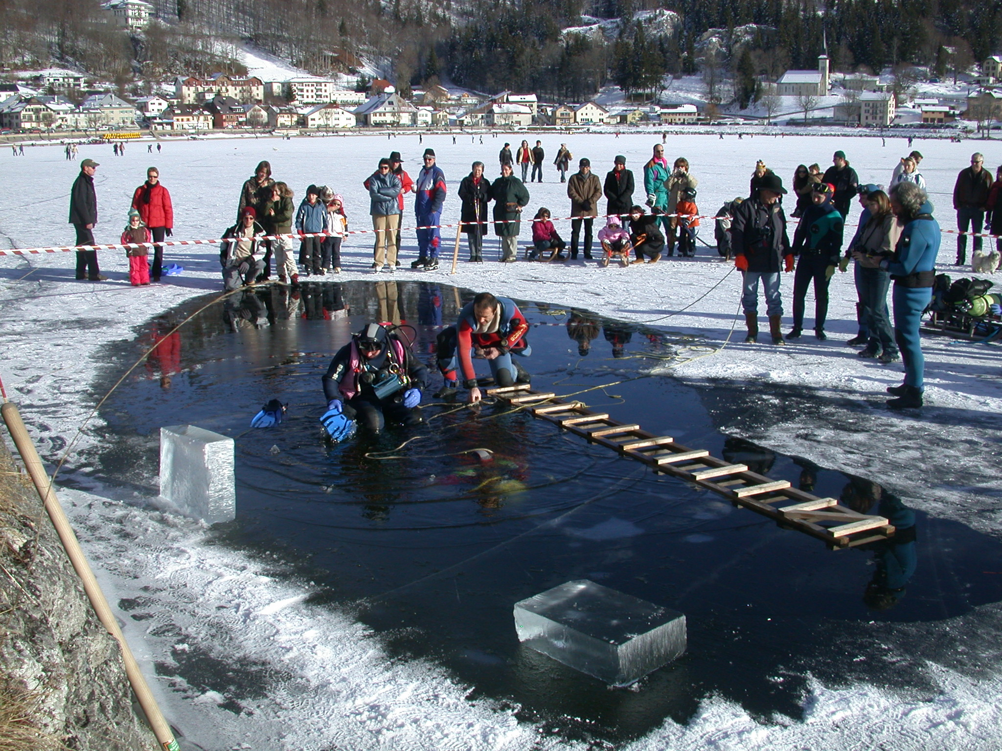 Plongée sous glace